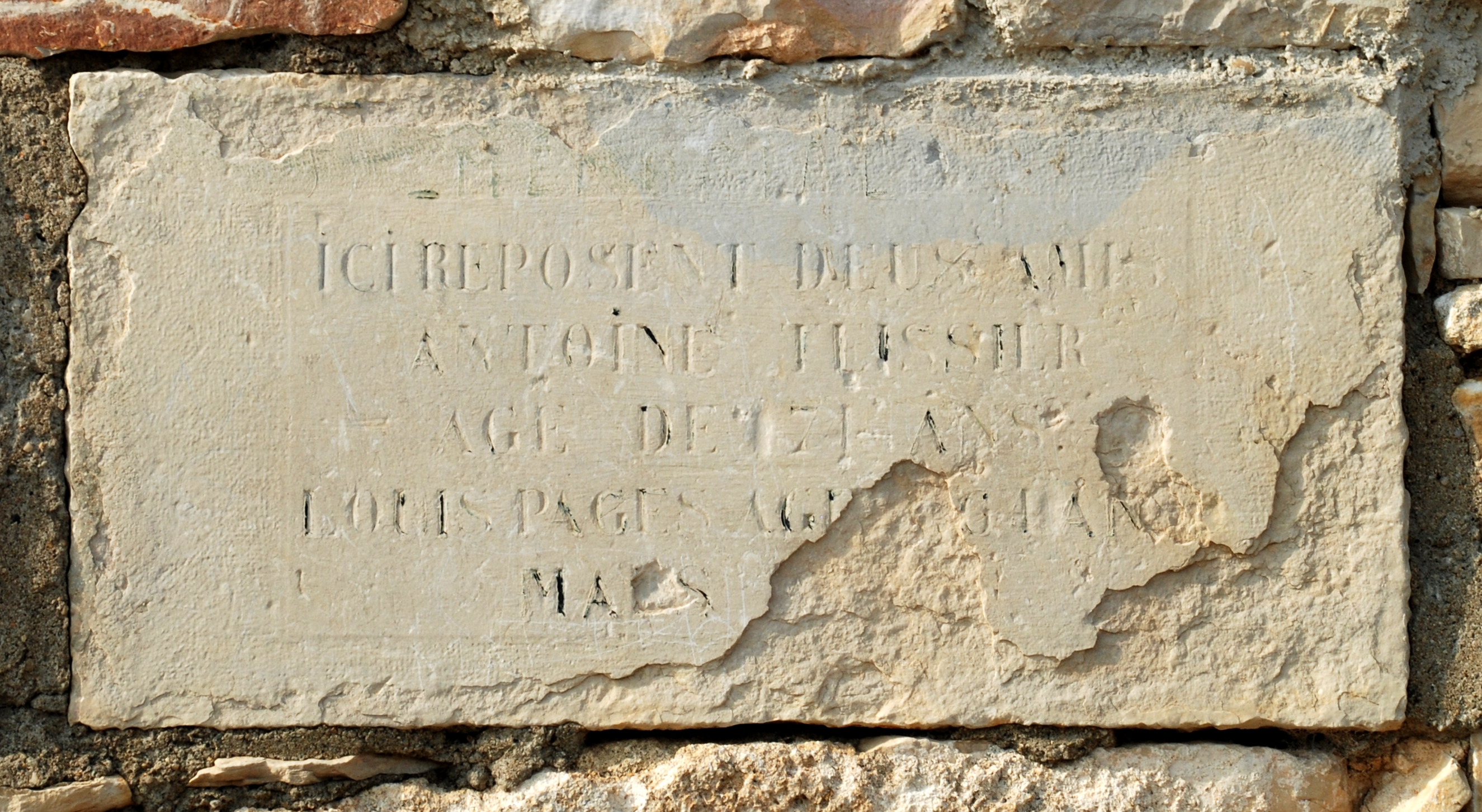 France - Gard - Calvisson - Roc de Gachone